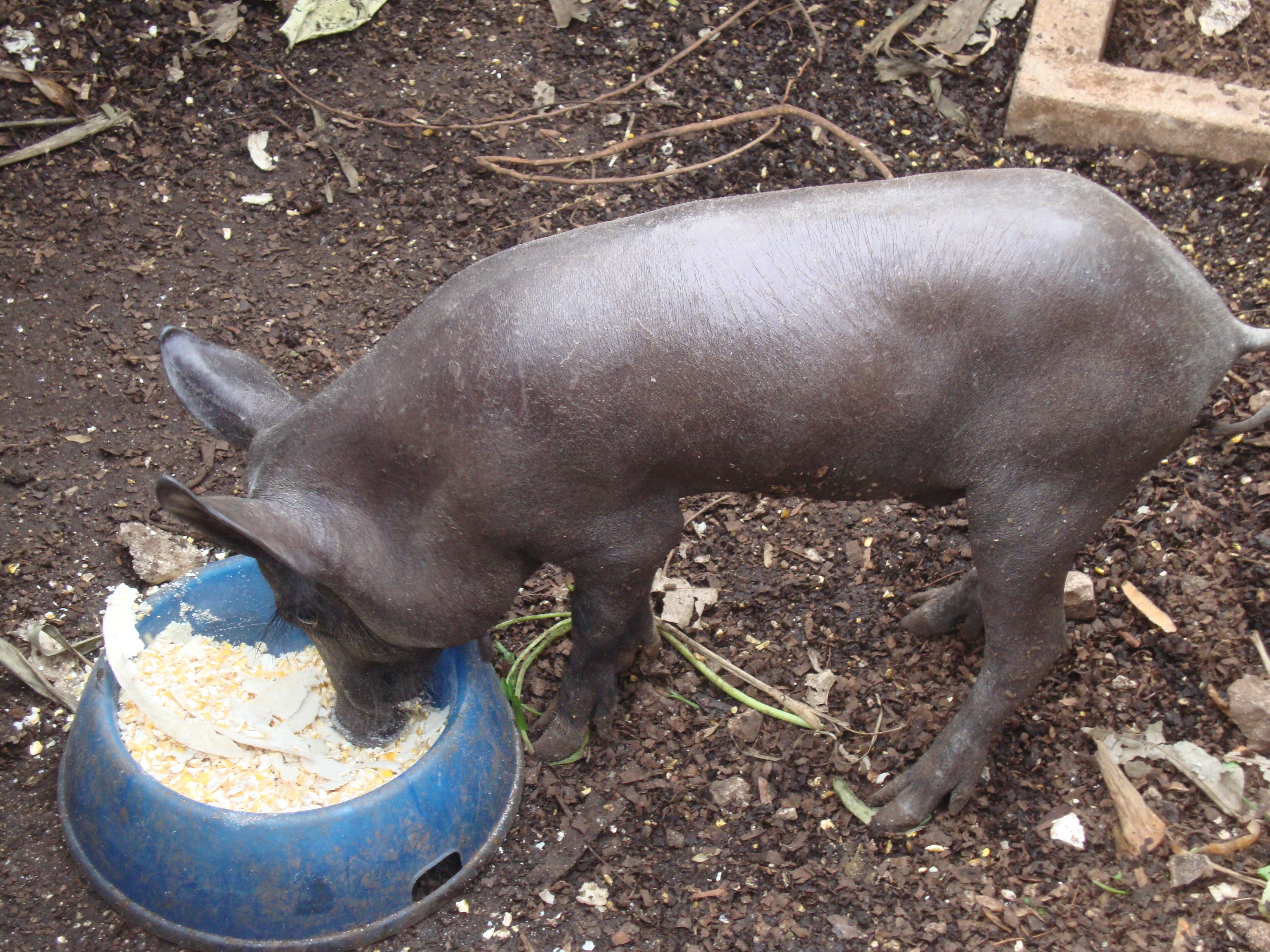 Cerdo Pelón